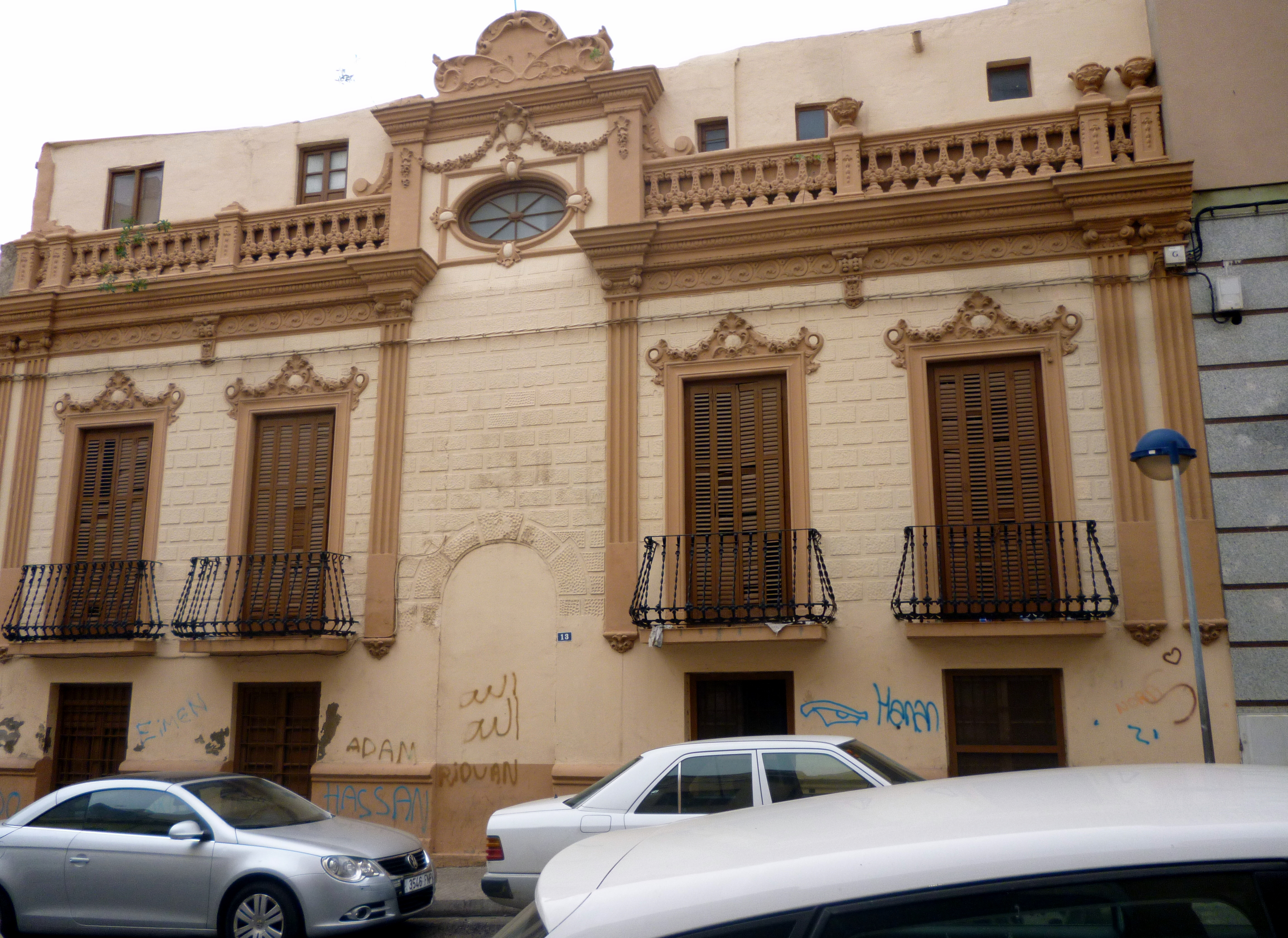 Gran Capitán, 9